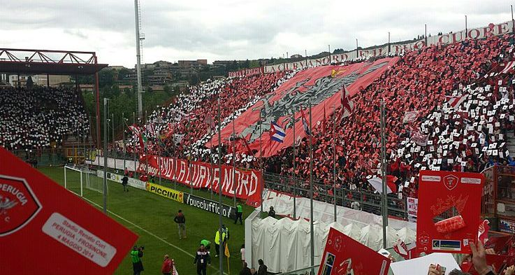 splendida giornata allo stadio di pian di massiano